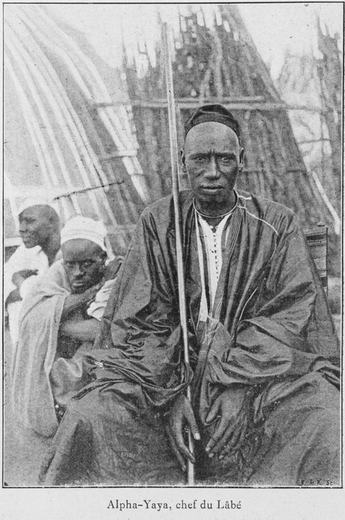 Alpha-Yaya, chef du Lâbè